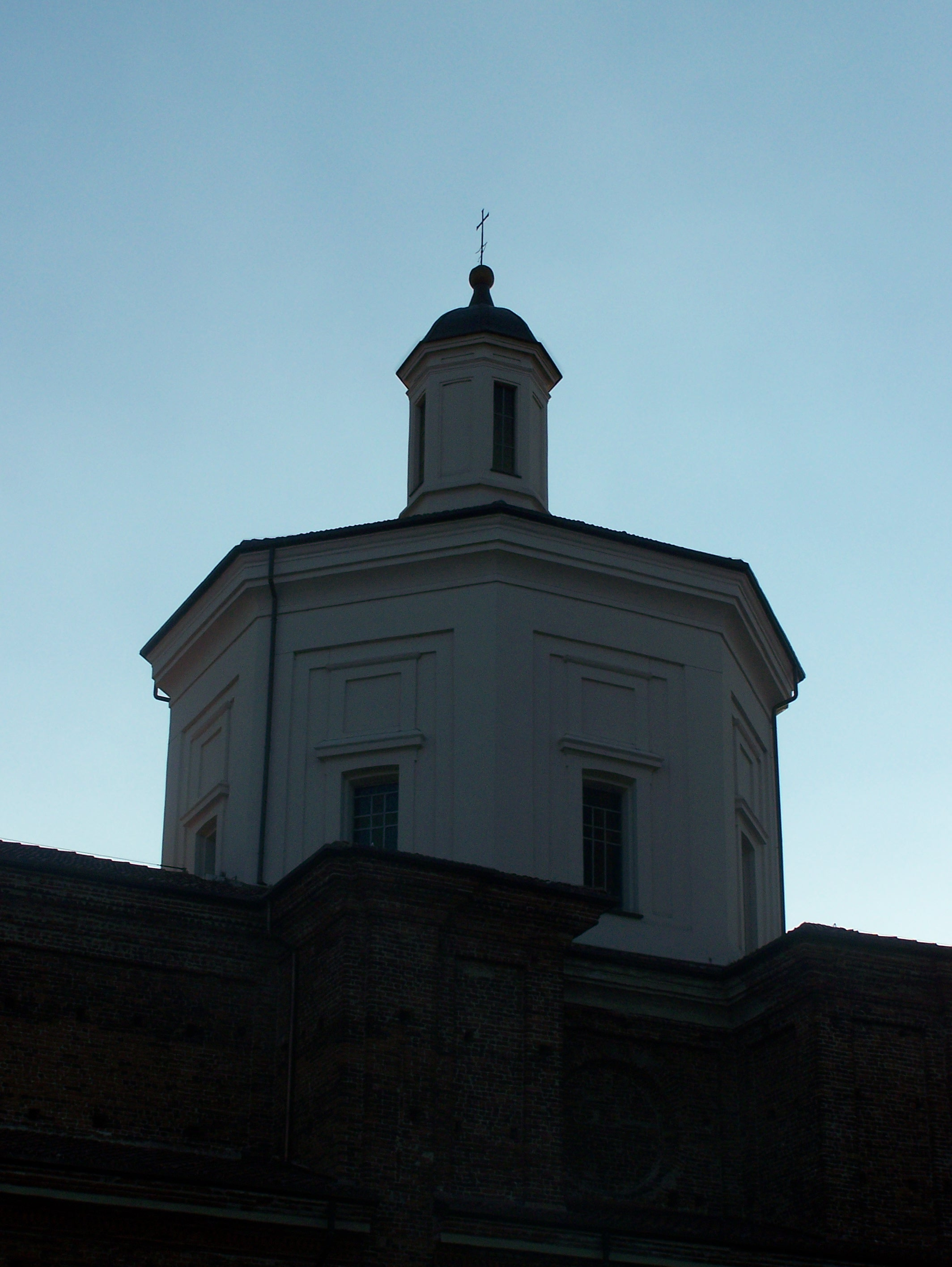 Il tiburio della chiesa parrocchiale di San Giorgio di Bernate Ticino (MI) - Italy - opera di Martino Bassi